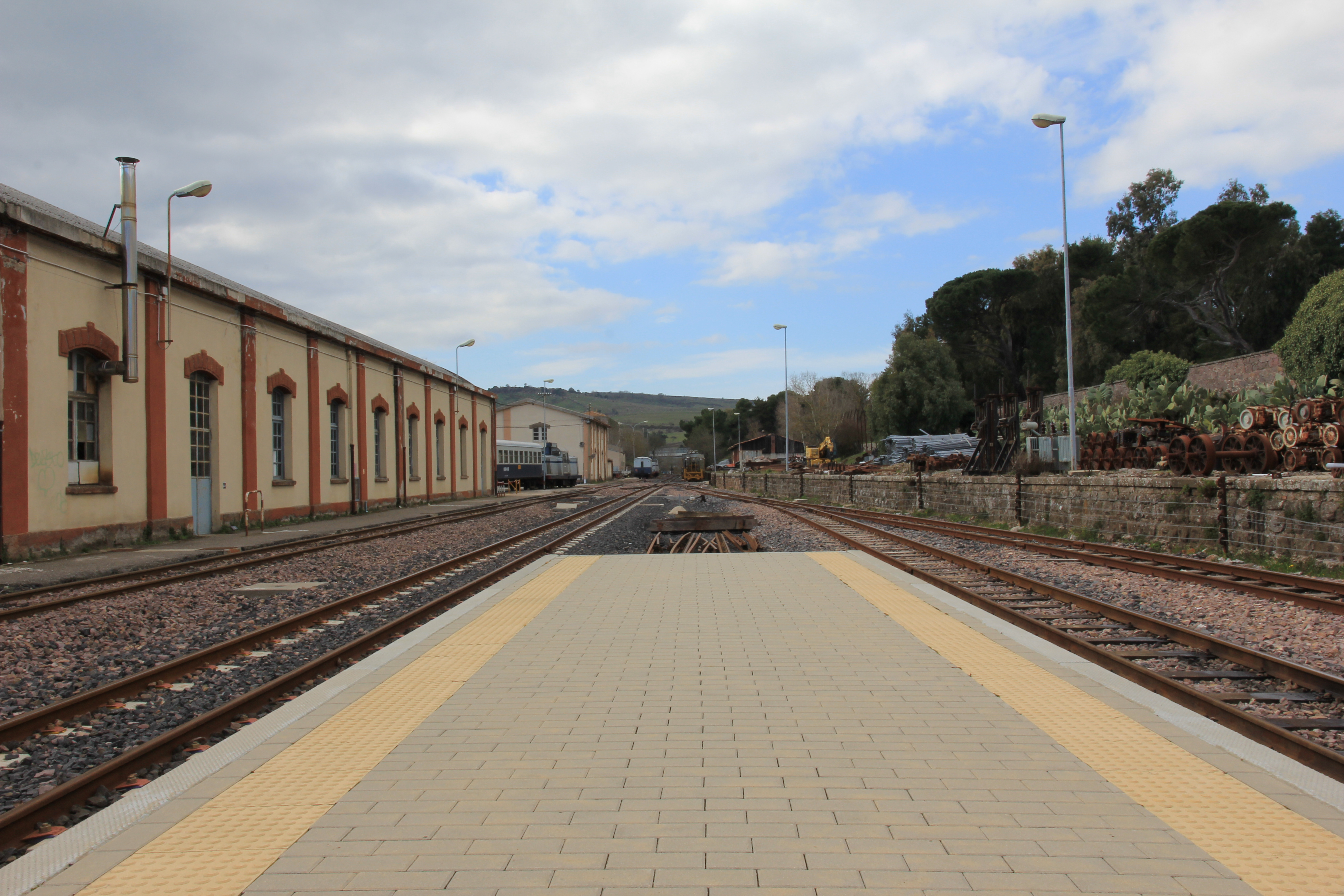 Macomer - Stazione ferroviaria ARST